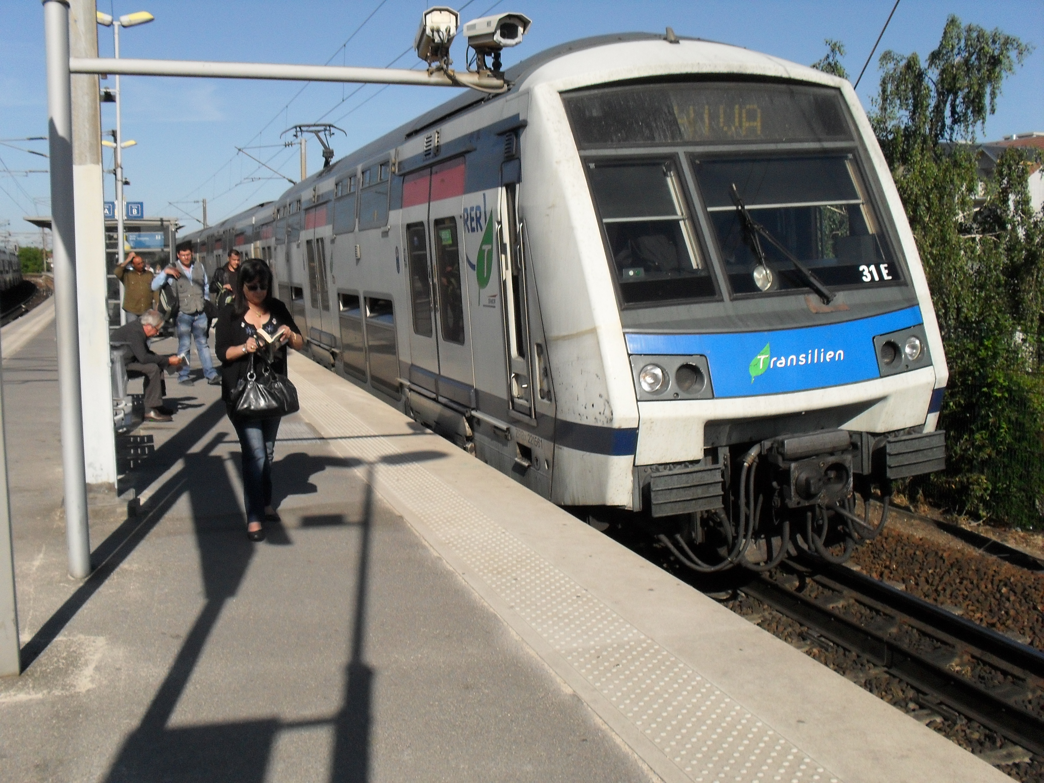 RER E - Gare de Villiers-sur-Marne - Le Plessis-Trévsie